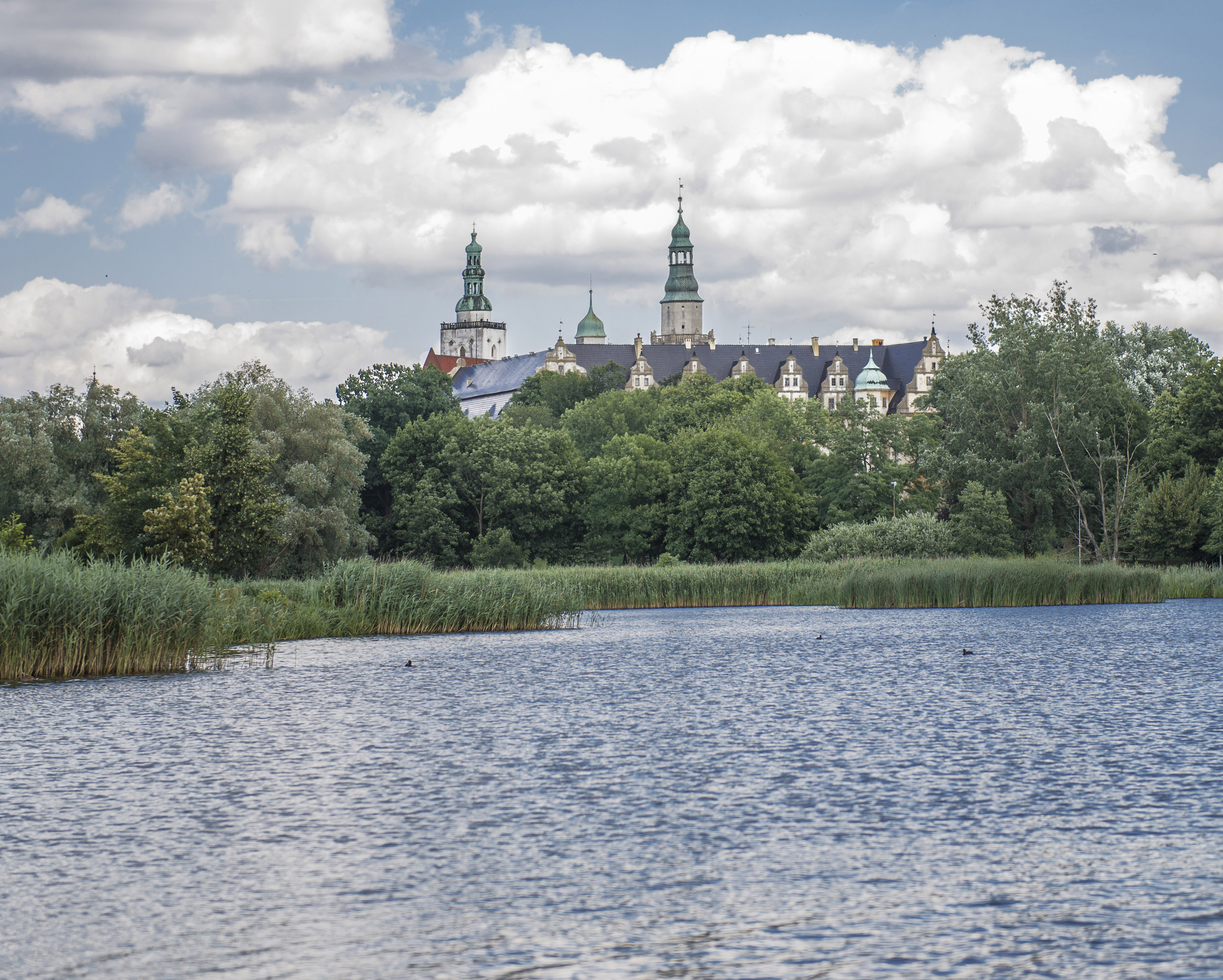 Park Książąt Oleśnickich